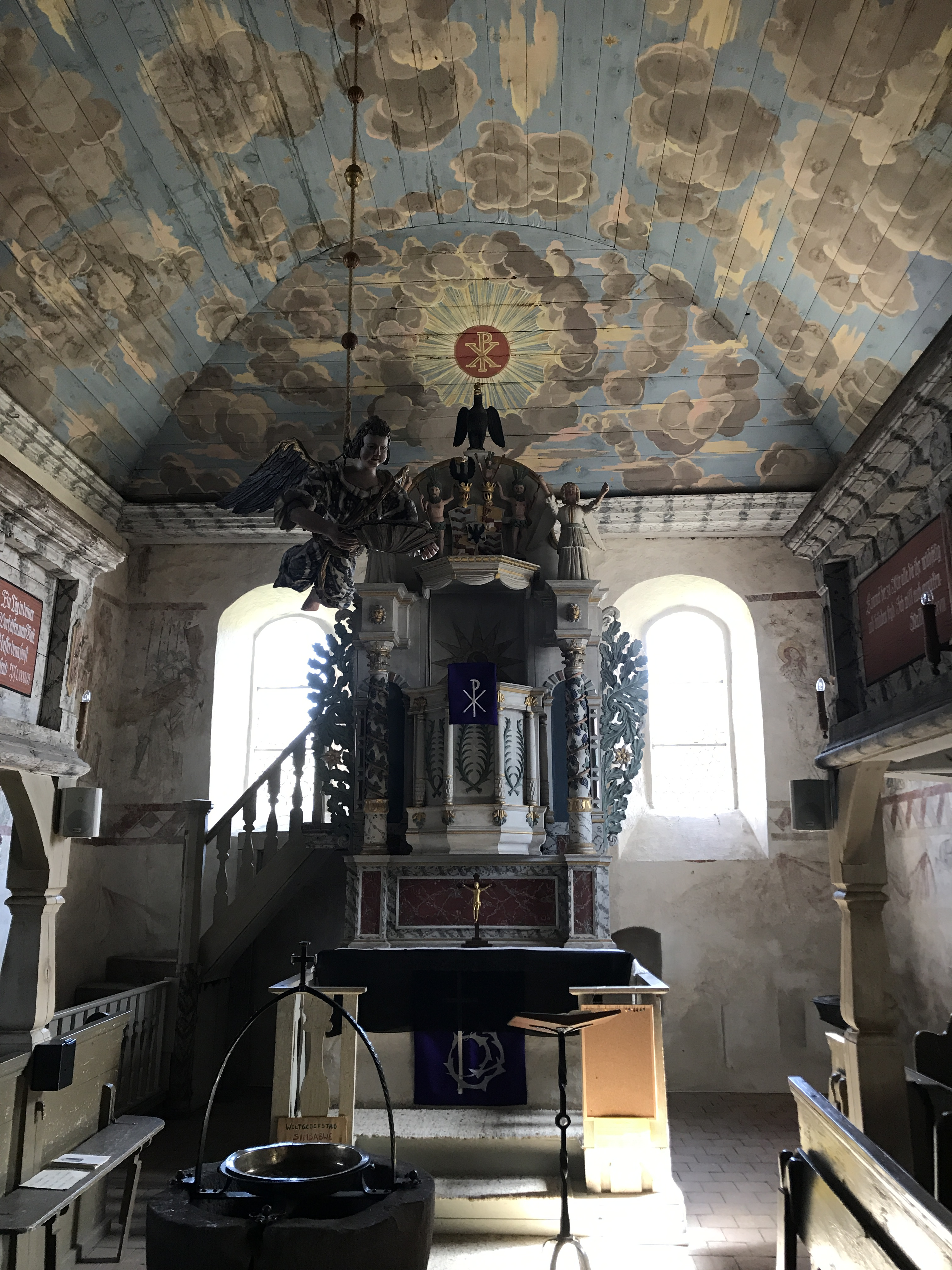 Die Dorfkirche Zaue ist eine spätromanische Feldsteinkirche in Zaue, einem Gemeindeteil von Ressen-Zaue der Gemeinde Schwielochsee im Landkreis Dahme-Spreewald. Im Innern hängt unter anderem ein Taufengel, den Tobias Mathias Beyermann im Jahr 1720 schuf.